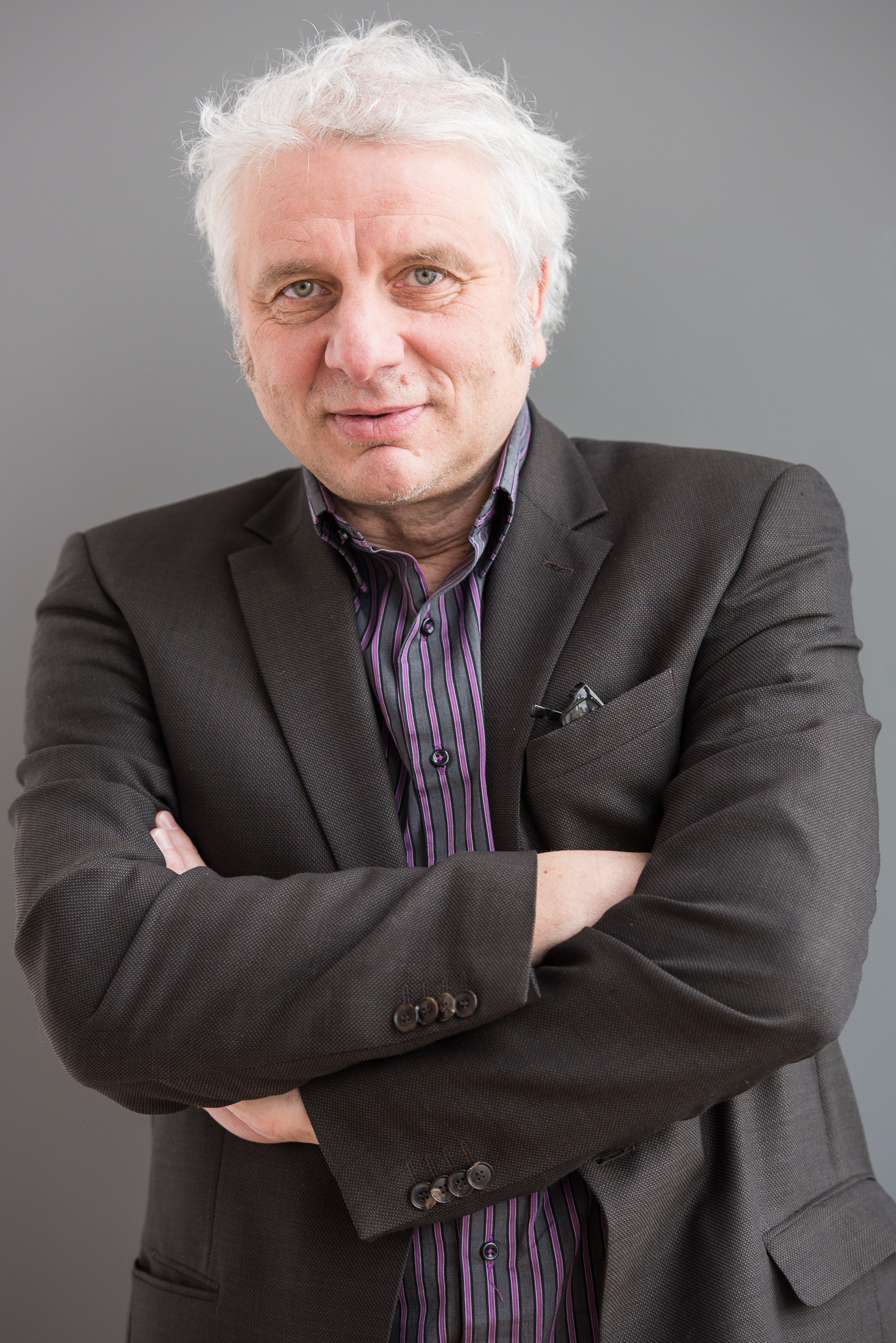 BR,Bayerischer Rundfunk,Bayerisches Fernsehen,Filmbrunch 2016,Udo Wachtveitl